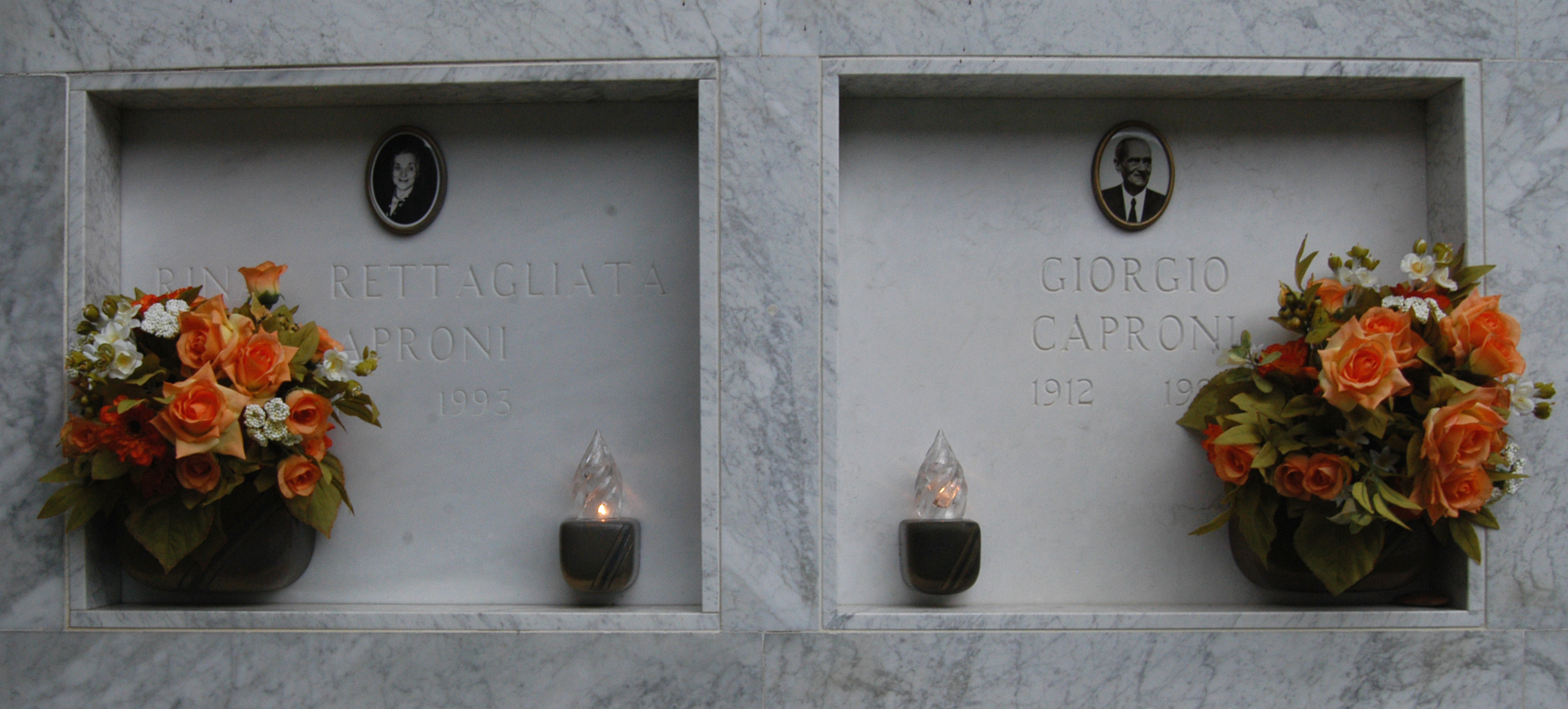 Foto della tomba del poeta Giorgio Caproni e della moglie